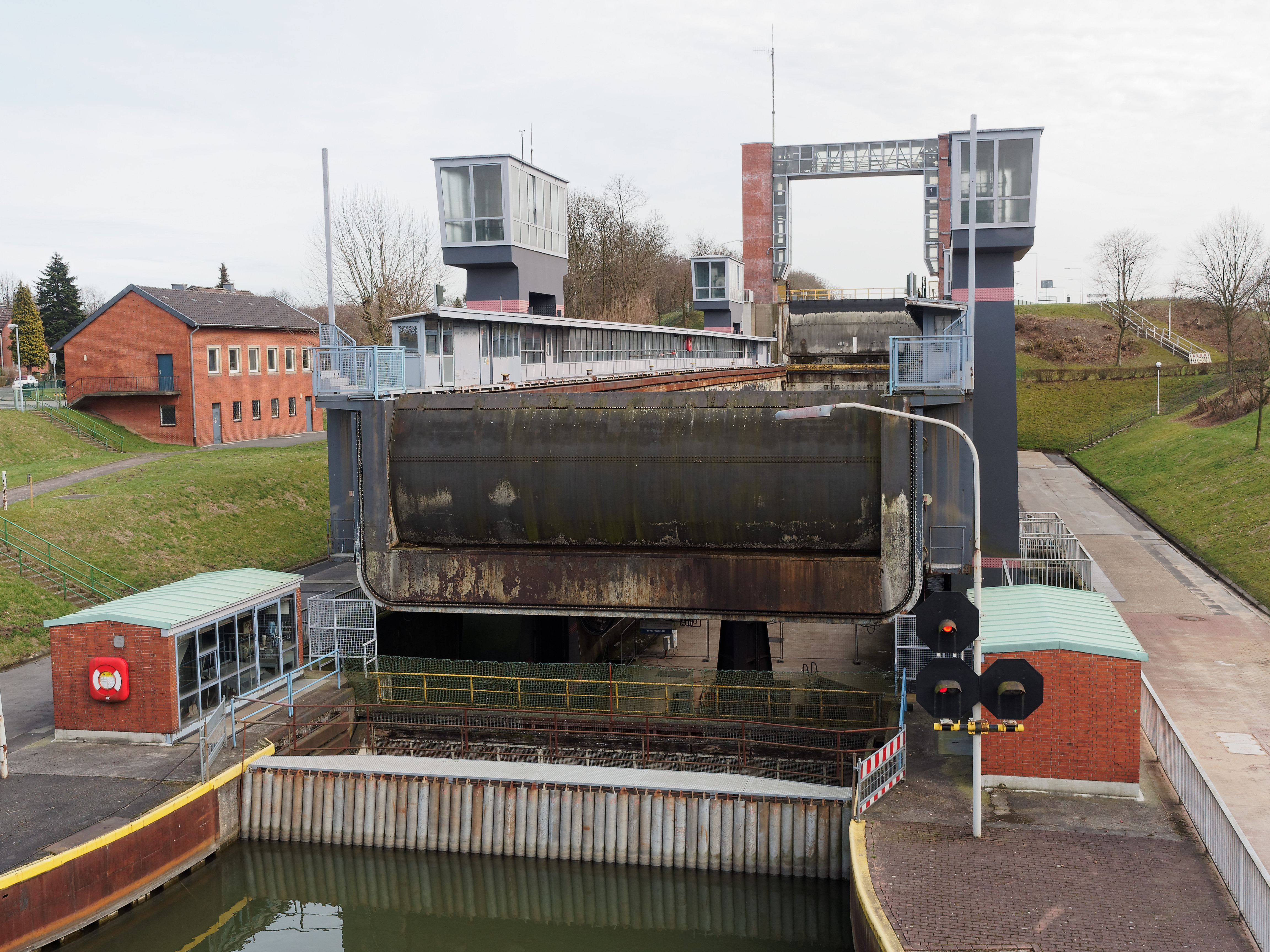 Das Neue Schiffshebewerk in Waltrop-Oberwiese von 1962, Ansicht von der westlich daran vorbeiführenden Straßenbrücke, seit 2005 nicht mehr funktionsfähig, Baudenkmal in Waltrop.